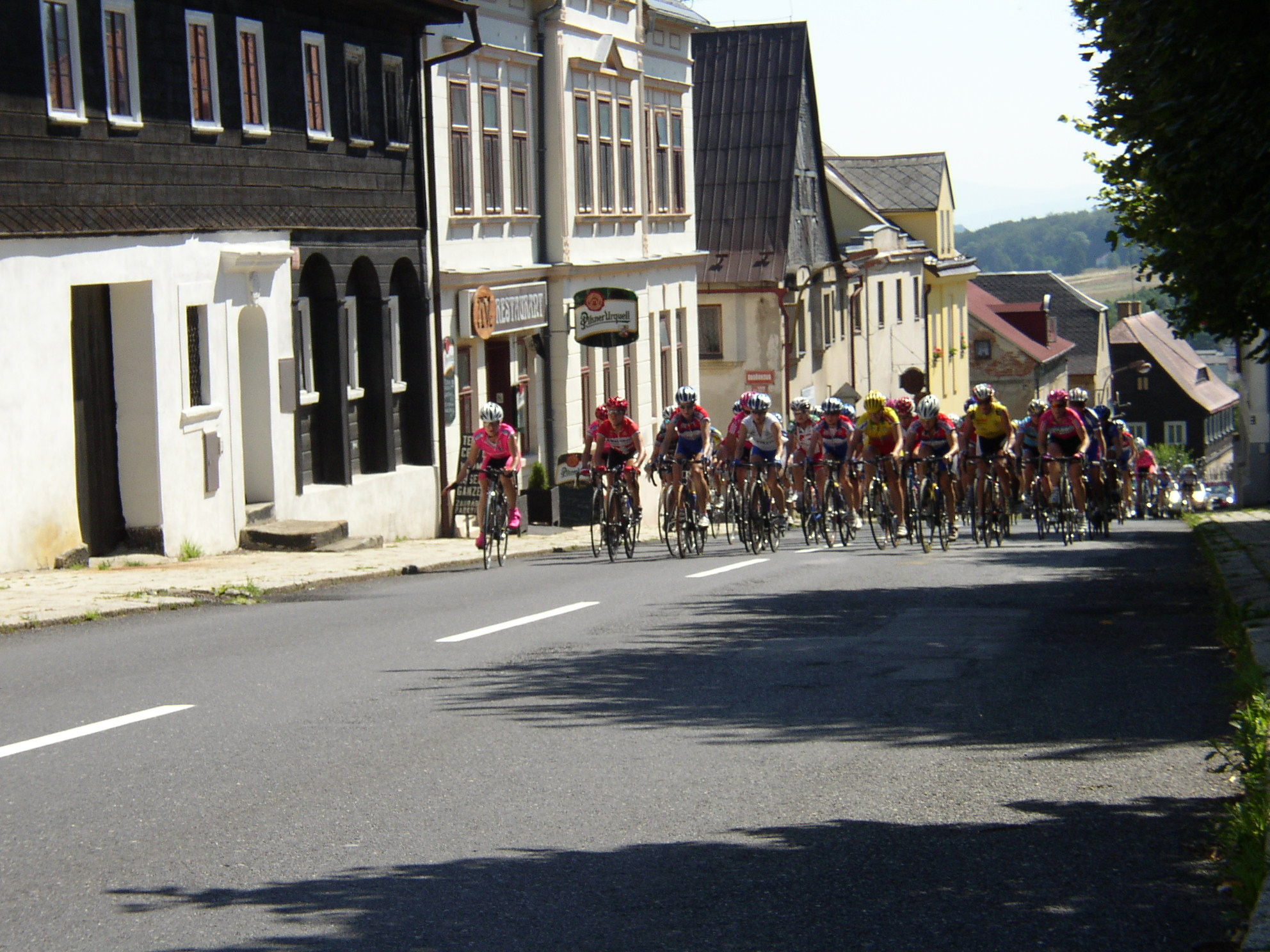 Průjezd Tour de Feminin Jiřetínem pod Jedlovou